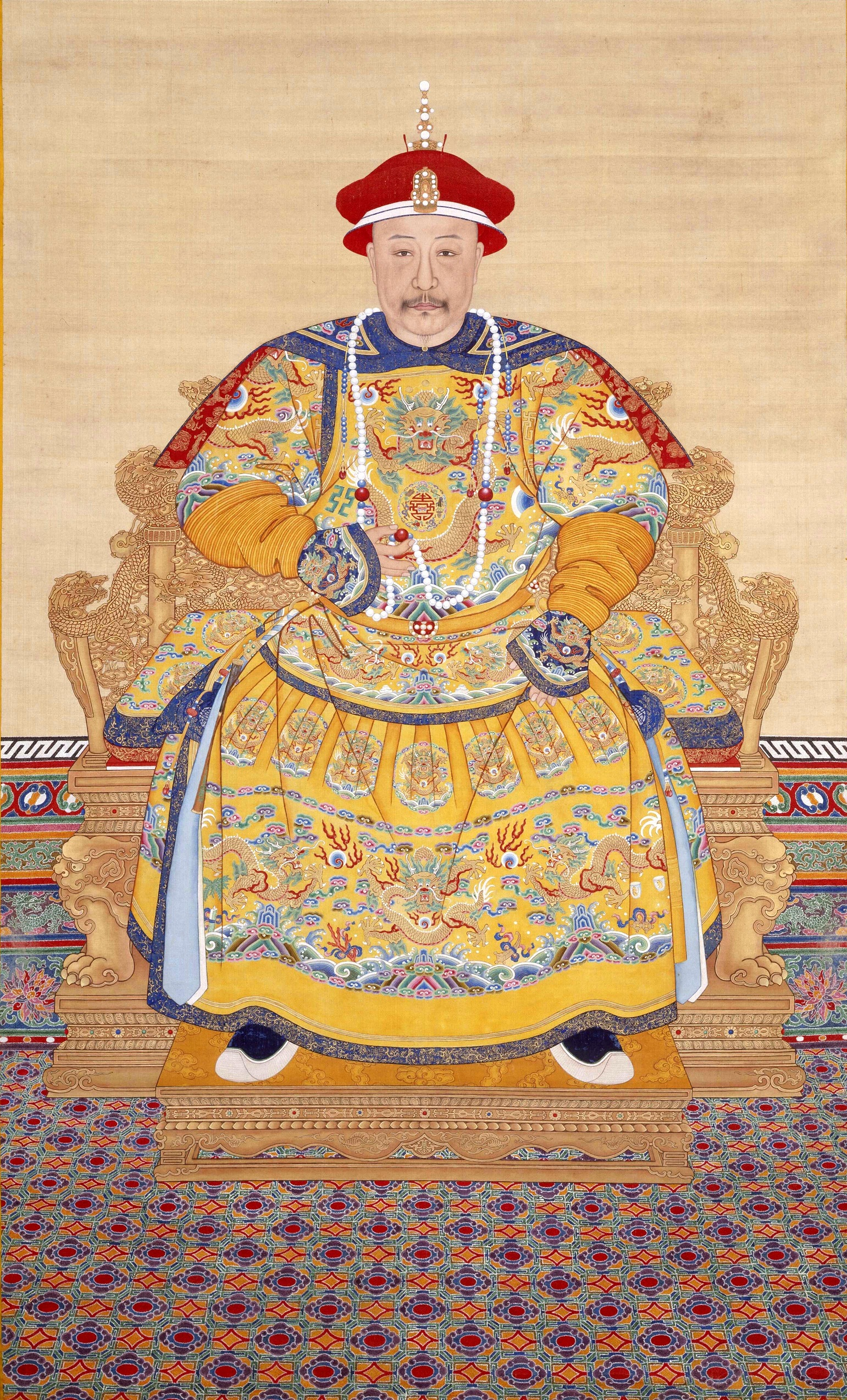 清 佚名 《清仁宗嘉庆皇帝朝服像》